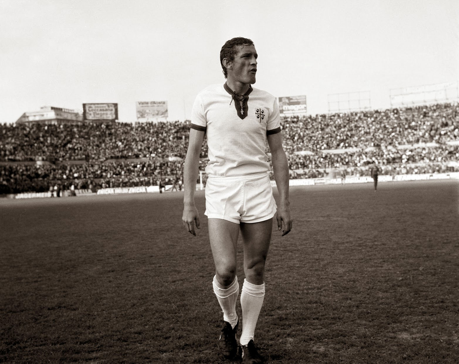 Il calciatore italiano Luigi "Gigi" Riva al Cagliari nella stagione 1969-70, quella dello storico scudetto del club sardo – primo successo assoluto, nella storia del campionato italiano di calcio, per una squadra del Mezzogiorno –; nell'immagine Riva indossa la seconda divisa dell'epoca del Cagliari, bianca con bordini rossoblù, spesso utilizzata in quell'annata per ragioni scaramantiche.